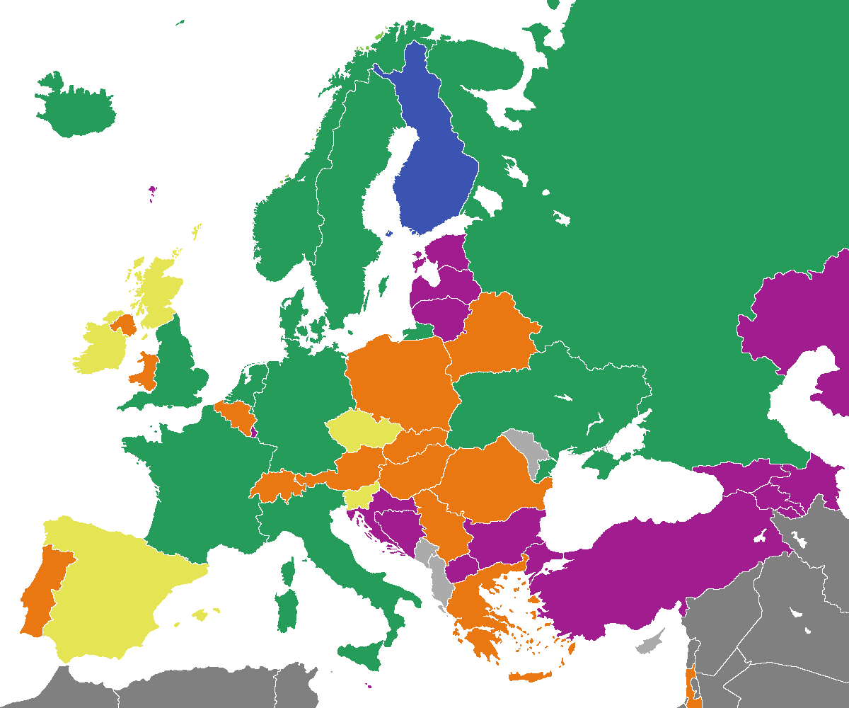 Qualifikation zur Fußball-Europameisterschaft der Frauen 2009